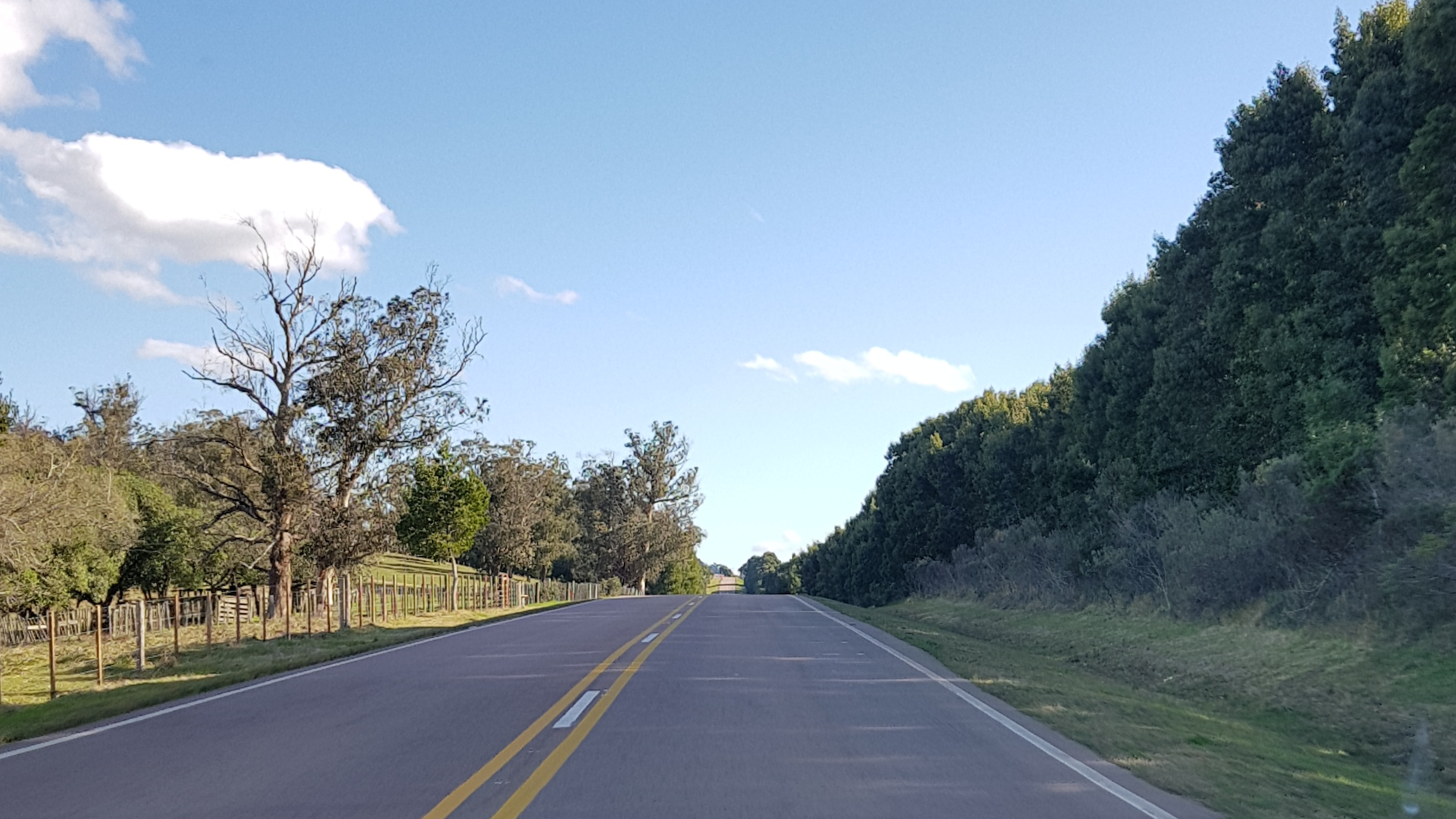 Ruta 13 en el departamento de Lavalleja, Uruguay